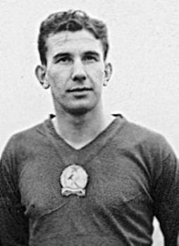 Zakariás József olimpiai bajnok magyar labdarúgó, edző, az Aranycsapat kiemelkedő balfedezete.